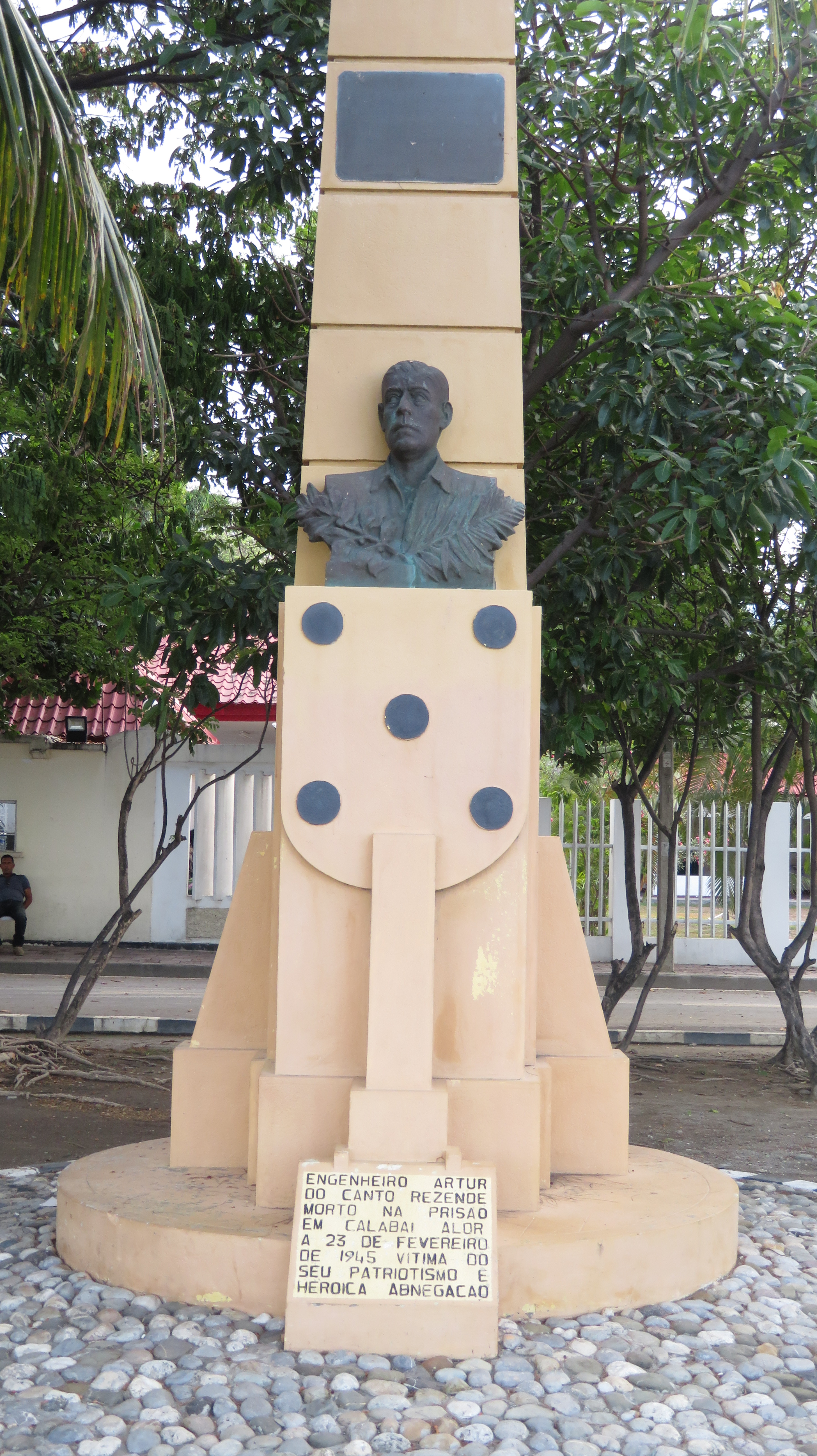 Monumento Canto Resende, Dili, Timor Leste